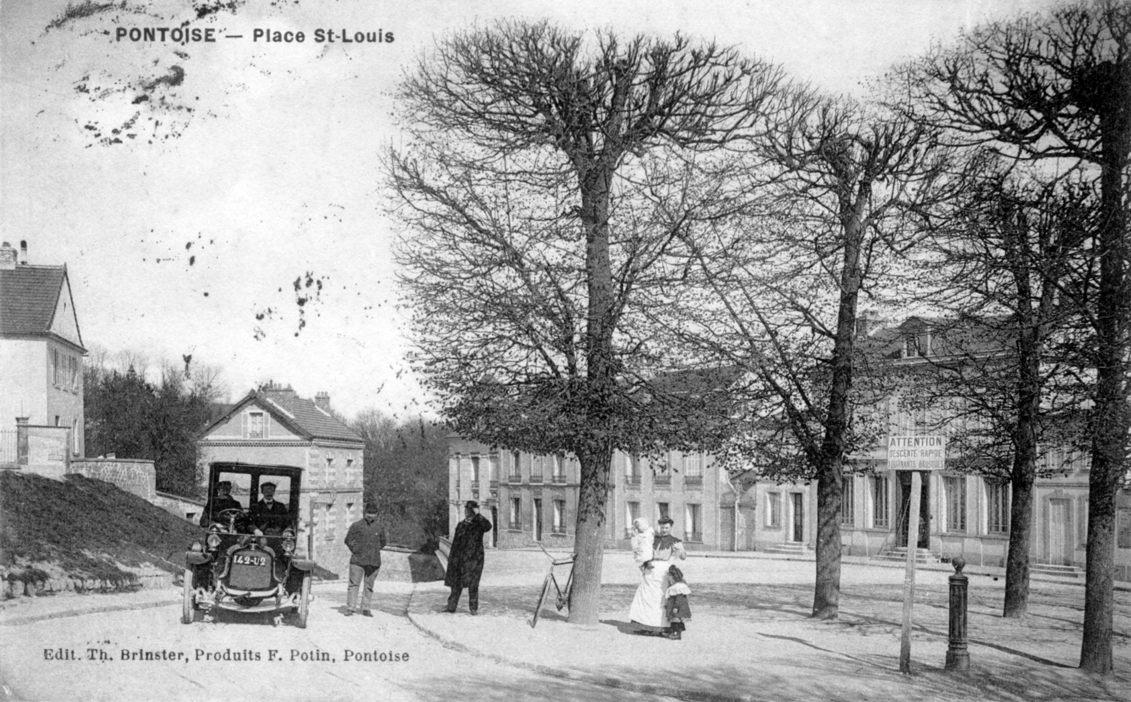 Pontoise. Place Saint-Louis. Carte postale ancienne Edit. Th. Brinster, Pontoise